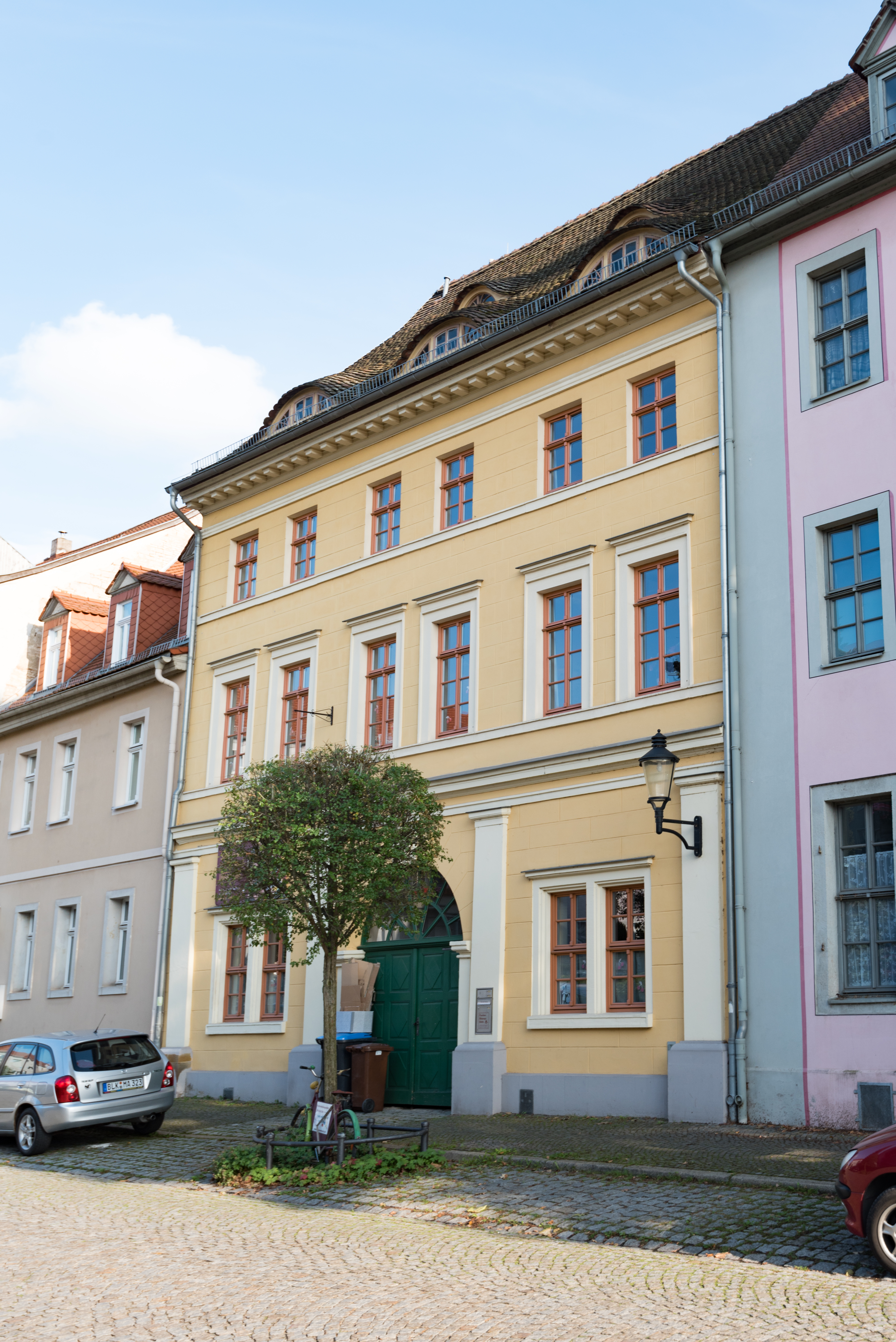 Naumburg (Saale), Neustraße 47